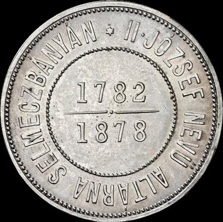 1 forint 1878 (Selmecbánya) - reverse